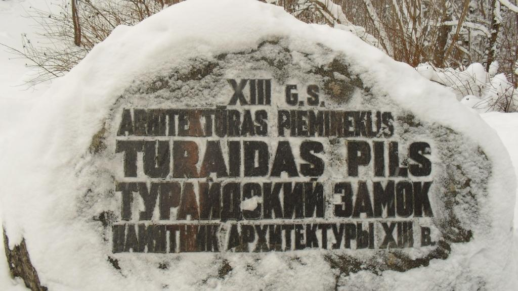 Камень в Турайдском замке